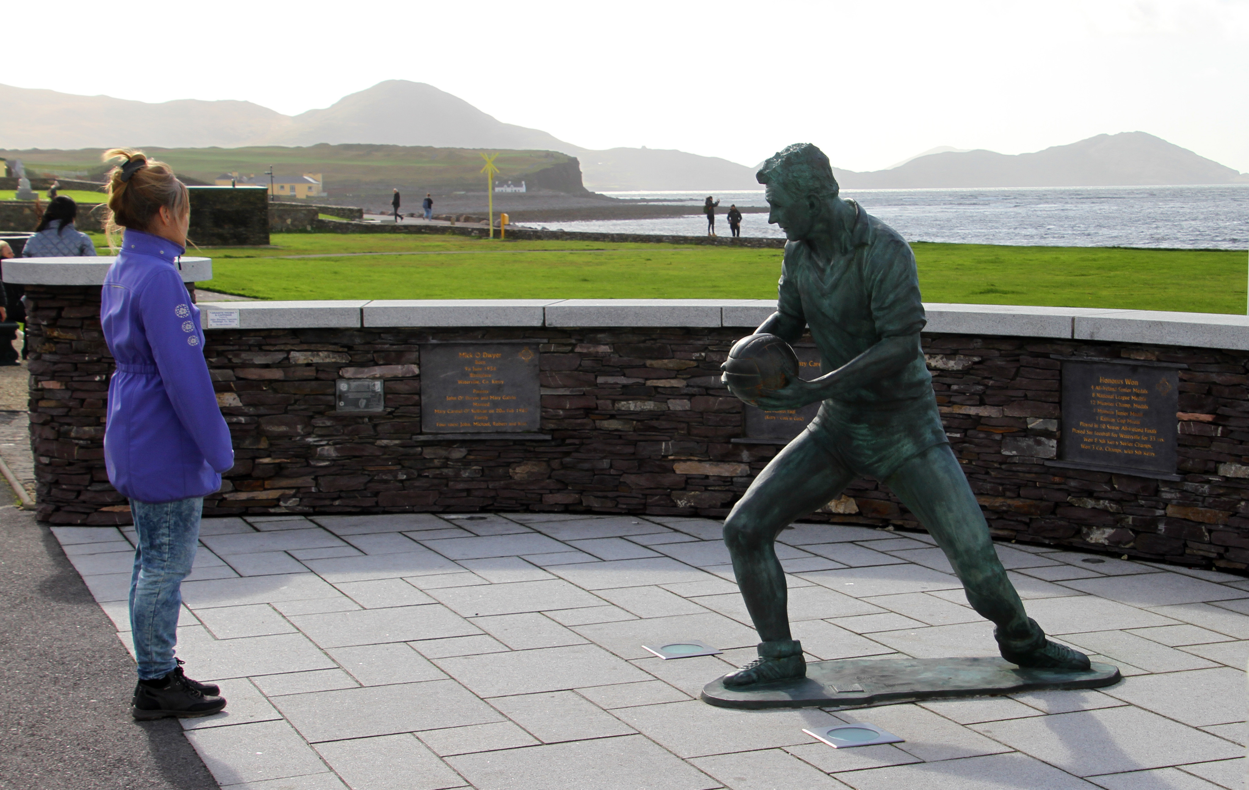 Waterville, County Kerry